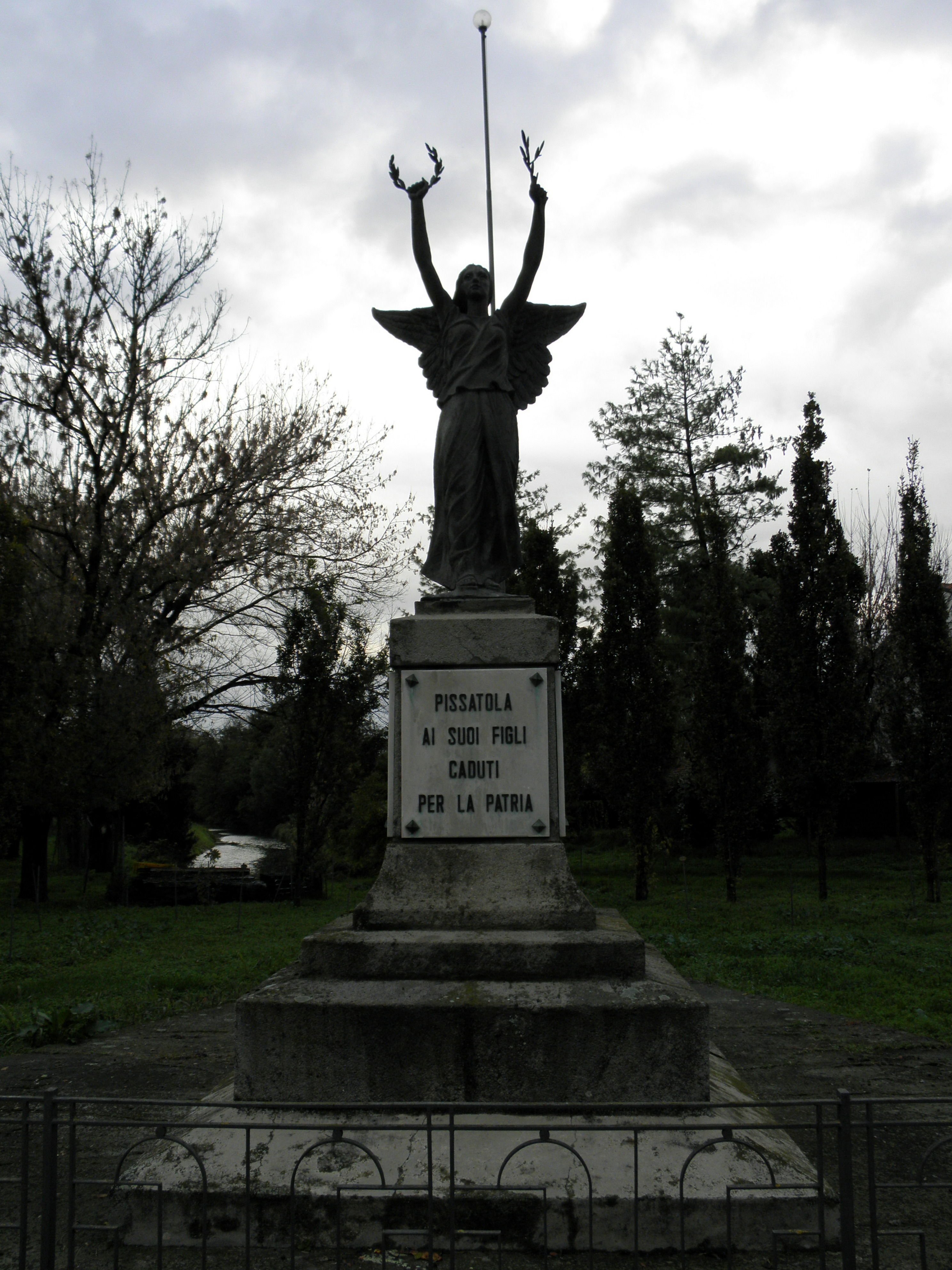 Pissatola, frazione di Trecenta: il monumento ai caduti posta in Piazza Roma.